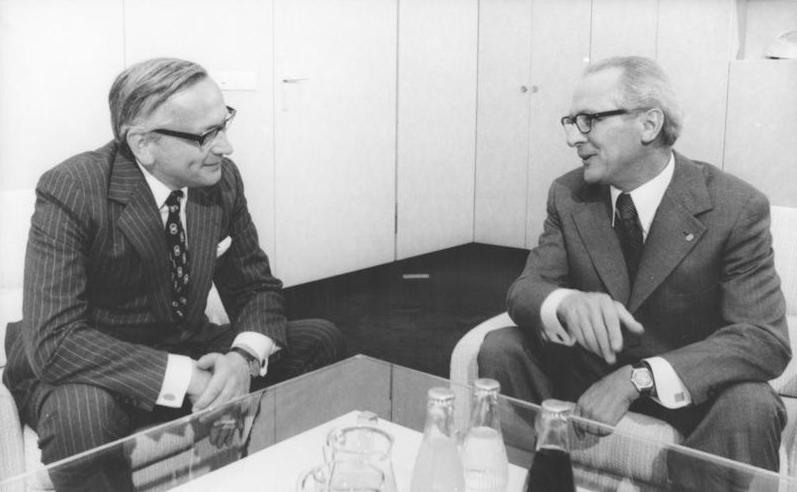 Berlin, Gespräch Günter Gaus mit Erich Honecker ADN-ZB/Koard/16.9.74/Berlin: Der Erste Sekretär des ZK der SED, Erich Honecker, empfing am 16.9.1974 den Leiter der Ständigen Vertretung der BRD in der DDR, Günter Gaus, zu einem Gespräch. Abgebildete Personen: Honecker, Erich: Staatsratsvorsitzender, Generalsekretär des ZK der SED, DDR (GND 118553399) Gaus, Günter: Leiter der Ständigen Vertretung in der DDR, Bundesrepublik Deutschland (GND 11951740X)